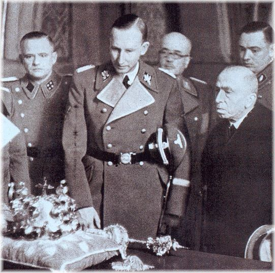 Эмиль Гаха демонстрирует Рейнхарду Гейдриху чешские коронационные регалии